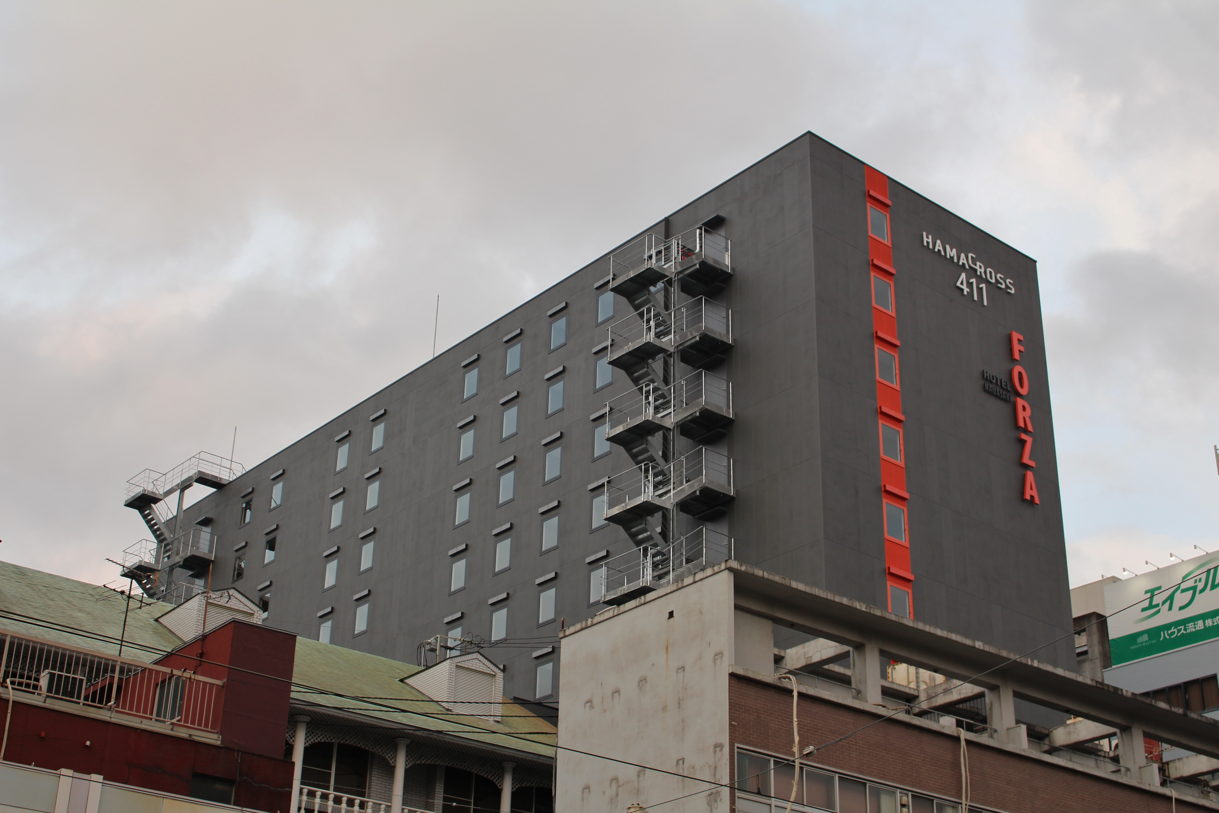 ハマクロス411 春雨交差点より